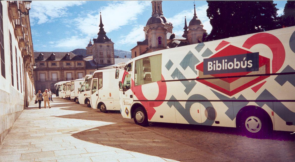 Bibliobús de Valladolid, en primer término, en la xposición de Bibliobuses correspondiente al I Congreso Nacional de Bibliotecas Móviles